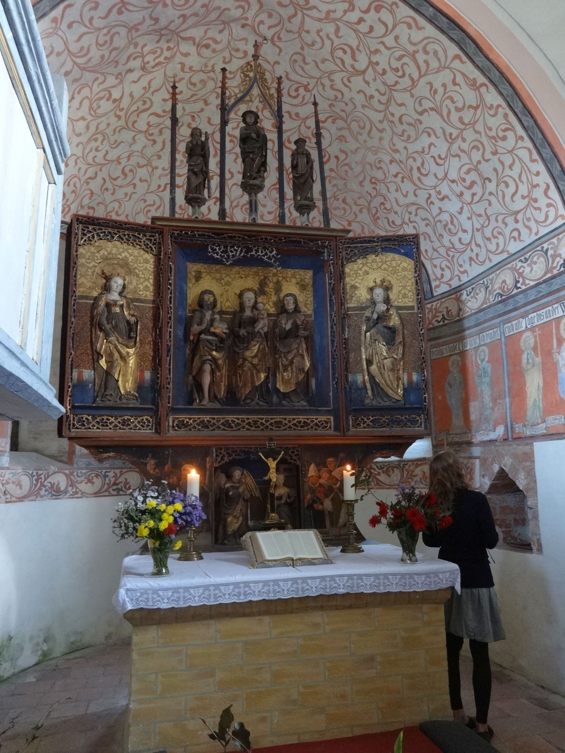 Altar der der Dorfkirche in Schönborn-Lindena